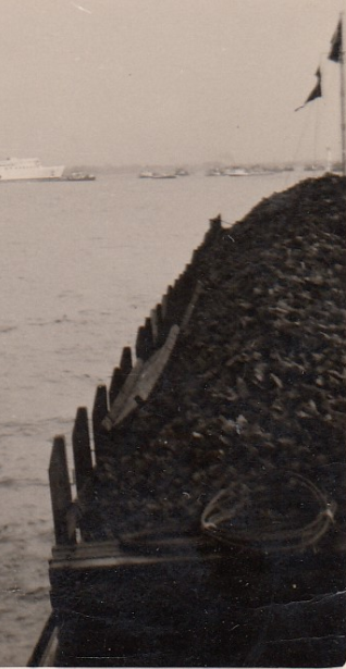 Binnenschipmet deklast waarbij de merkels en de luiken gebruikt zijn. De foto is in 1960 ter hoogte van Emmerich gemaakt